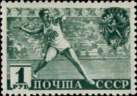 Серия «Готов к труду и обороне СССР!»: метание гранаты, серо-зелёная. Глубокая печать на бумаге, без водяного знака, перфорирована: комбинированная гребенчатая зубцовка 12:12½ (на каждые 2 сантиметра края марки приходится 12:12½ зубцов). Официальных разновидностей нет. В марочных листах по 100 (10×10) экземпляров.